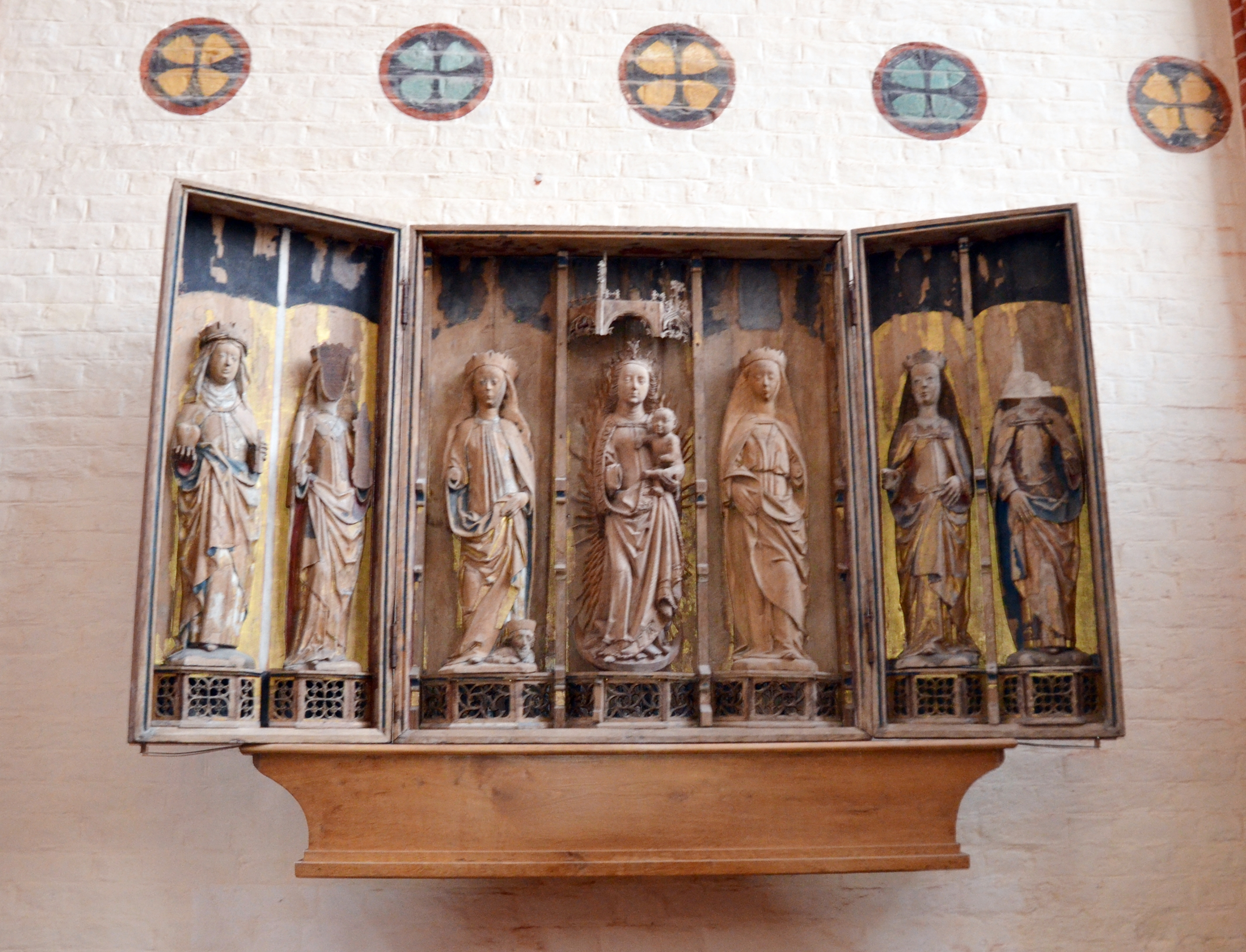 Jungfrauenaltar, Nikolaikirche (Wismar), spätes 15. Jh.